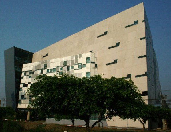 ตึกคณะทันตแพทย์ ม.รังสิต